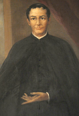 Presbitero Francisco Xavier Bogarin